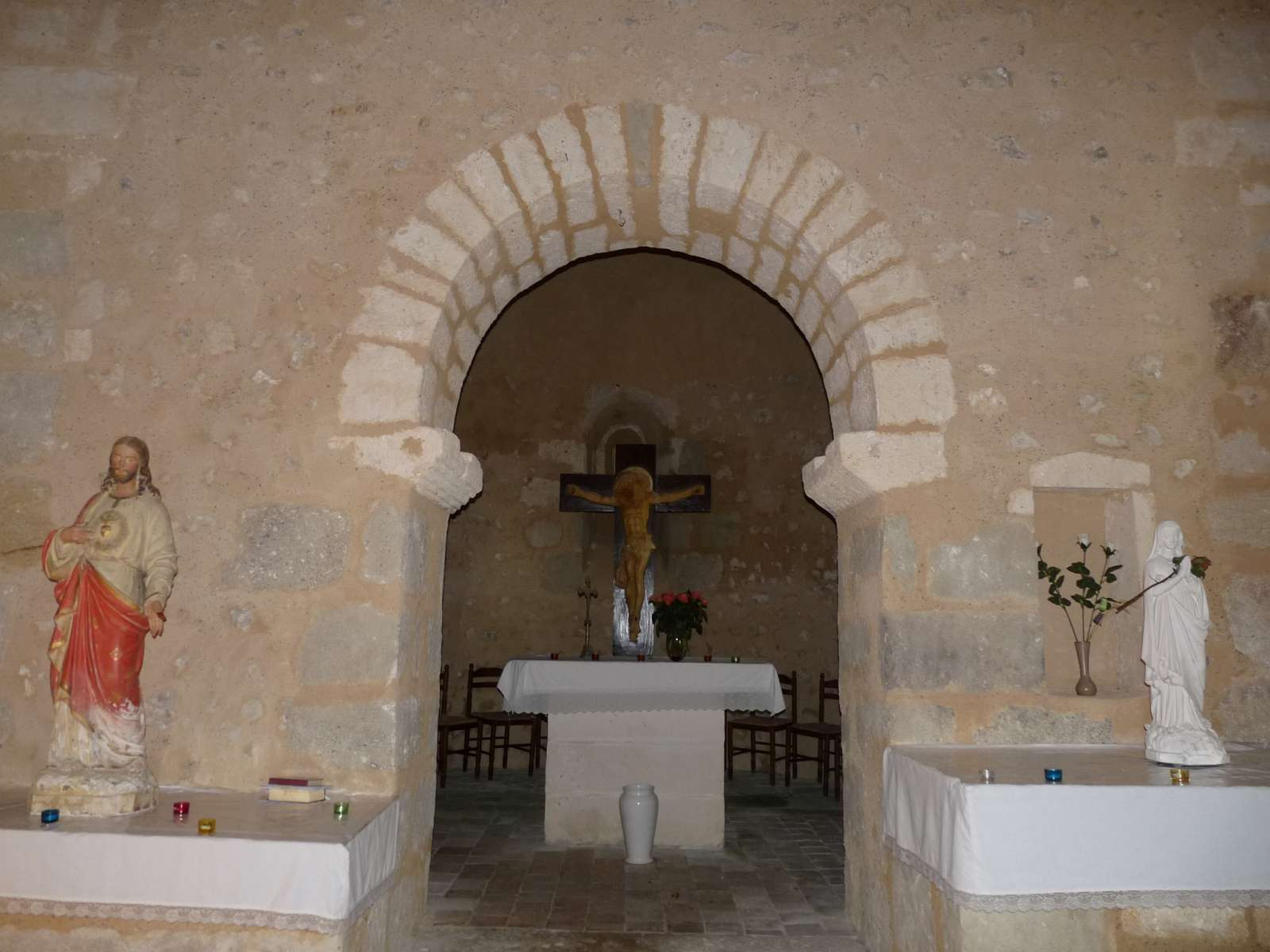 église de St-Léger, Charente, France